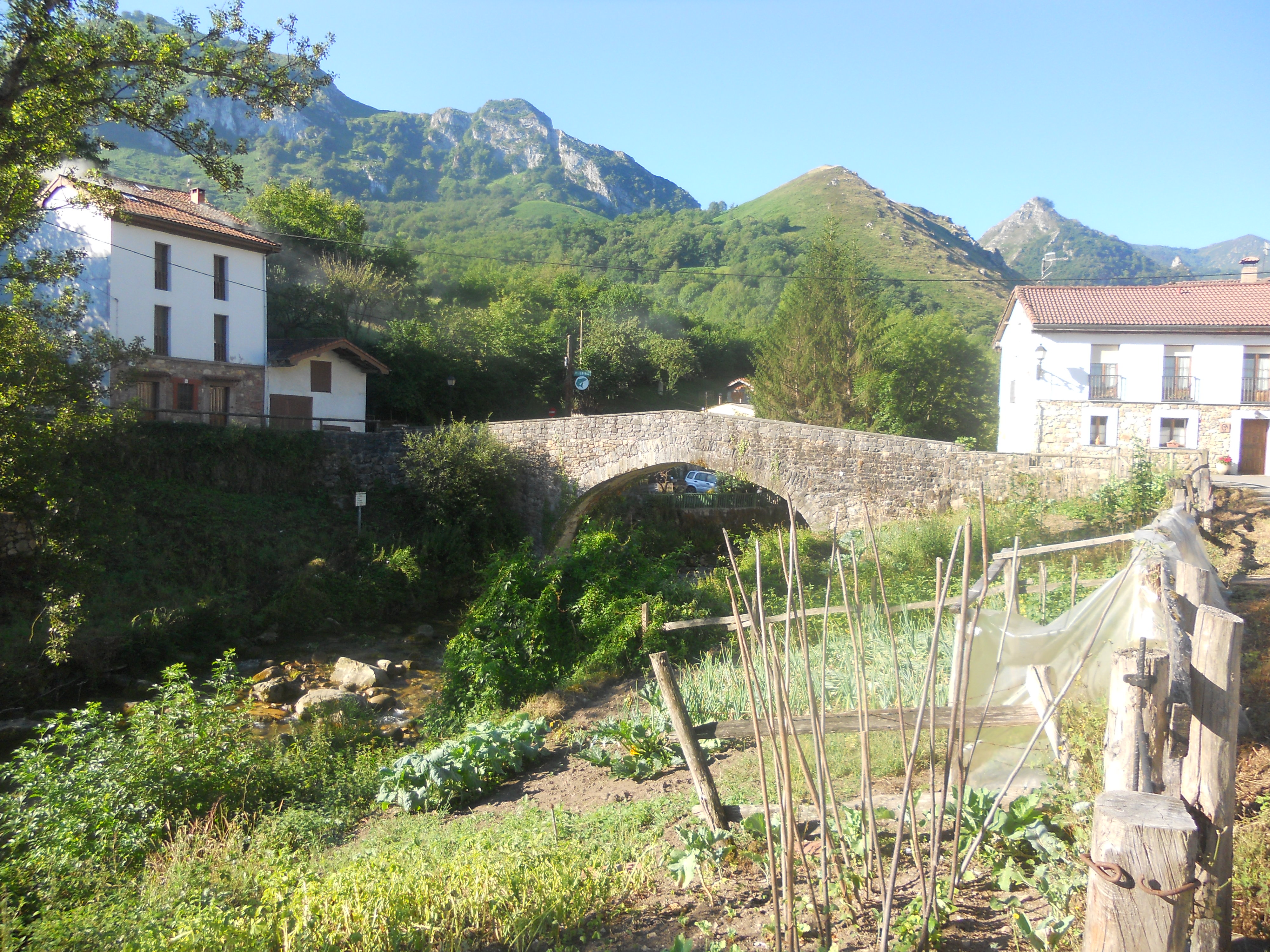 Soto de Agues , Sobrescobio - Asturias.